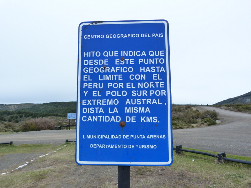 Cartel que muestra la mitad de Chile si condiremos el norte la frontera con Perú y el sur con la Antártica.